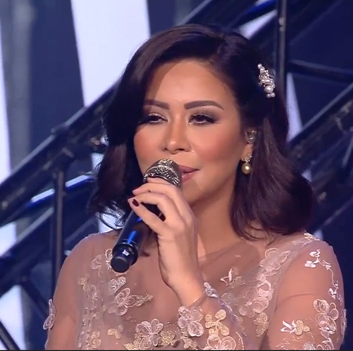 شيرين في اراب ايدول